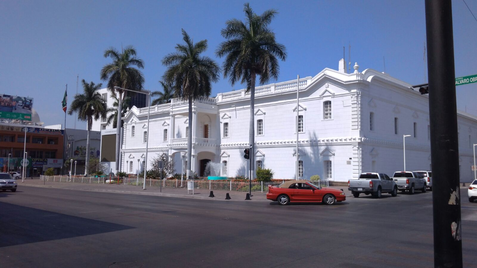 Fotografía del Edificio del Ayuntamiento del municipio de Culiacán Sinaloa México